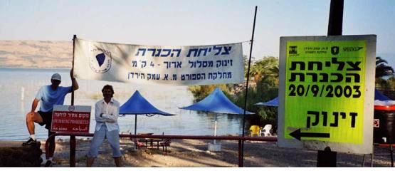 שילוט מכוון לנקודת הזינוק של צליחת הכנרת